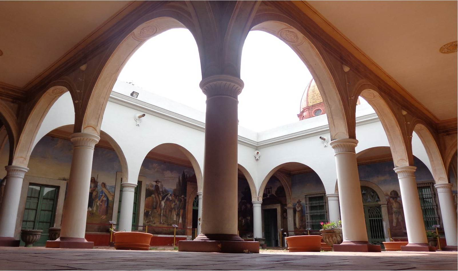 La finca conocida como La Moreña, es una joya arquitectónica ubicada a un costado de la plaza principal de La Barca, construida en 1855. El principal atractivo del museo, son los murales que se presentan en los cuatro corredores del patio principal realizados por el maestro Gerardo Suárez